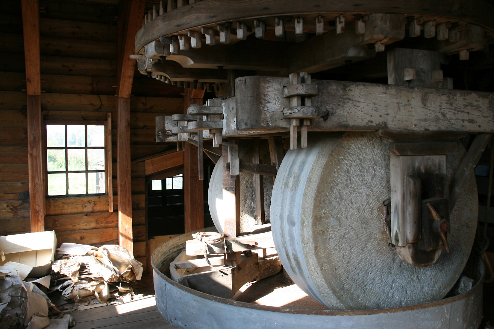 Westzaan: papiermolen De Schoolmeester - kantstenen